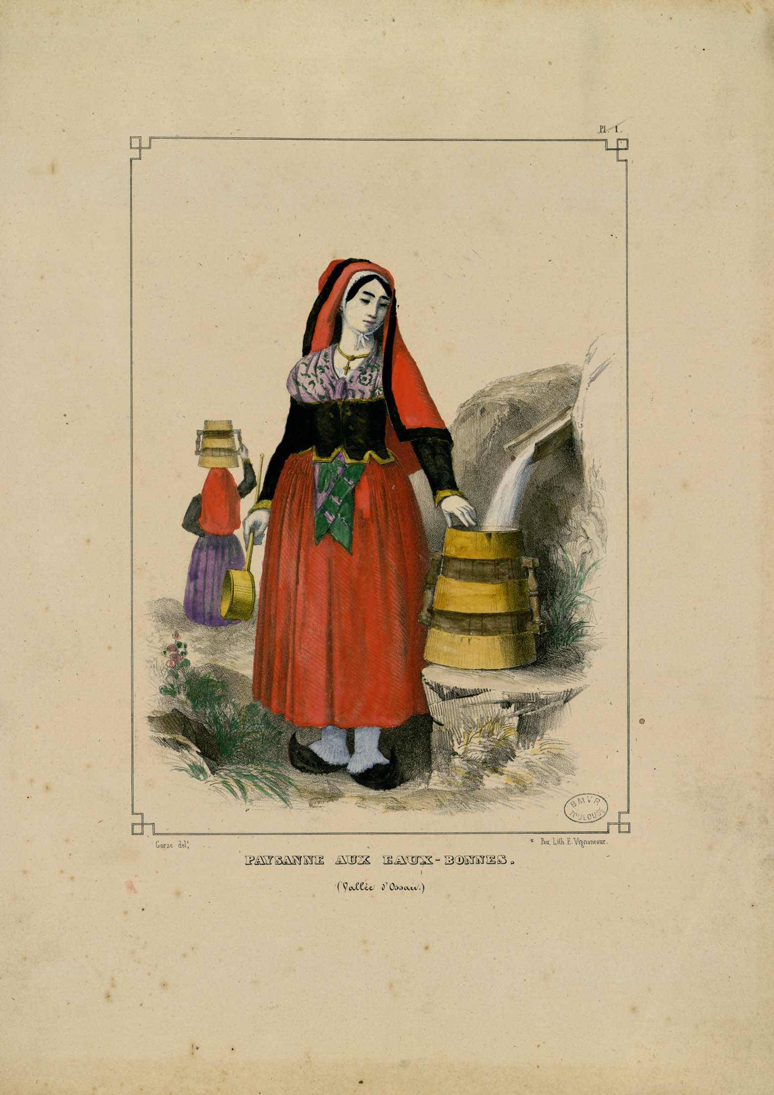 Fait partie d'un ensemble de planches : pl. 1 extraite de "Album Pyrénéen" ; pl. 4 à 12 extraites de "Souvenir des Pyrénées". Pl. 1 à 3 lithographiées par Vignancour. Pl. 4 à 12 imprimées par Lemercier et publiées chez Auguste Bassy à Pau. Esquisse au crayon au dos de la lithographie représentant une danseuse accompagnée de musiciens Ancely, René (1876 - 1966). Possesseur